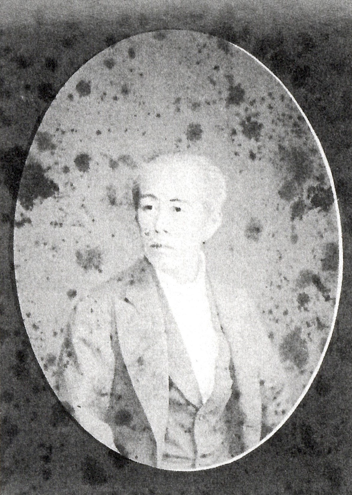 相馬充胤の肖像写真。